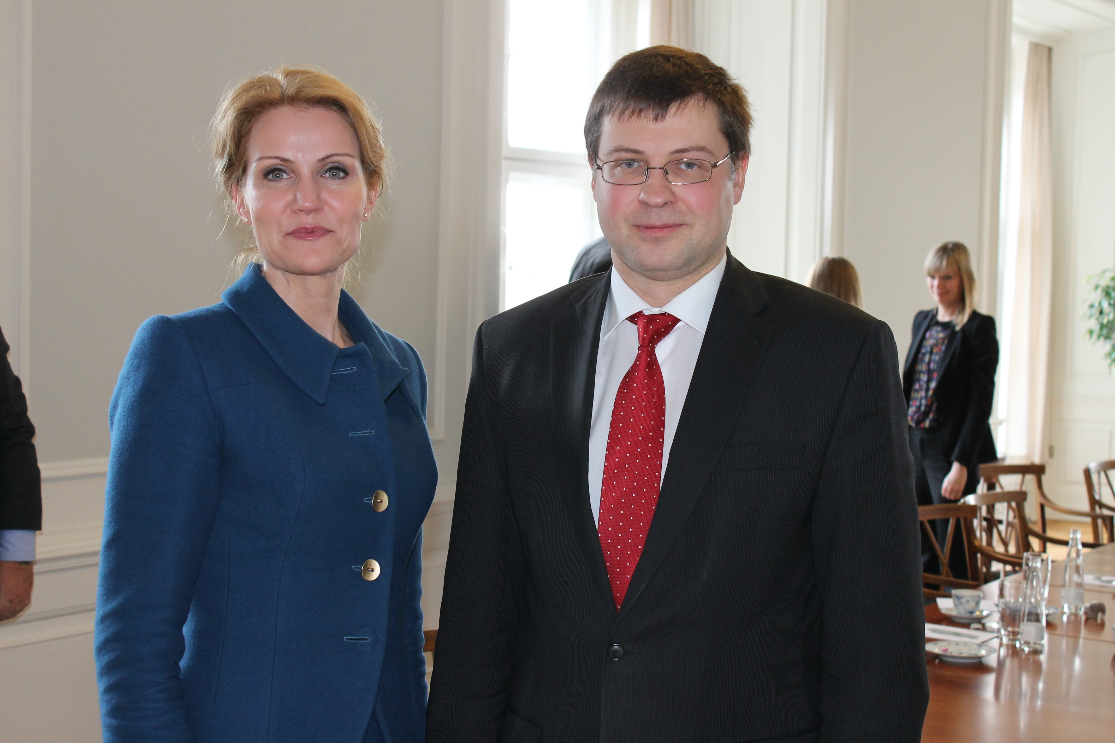 2012.gada 16.aprīlī Ministru prezidents Valdis Dombrovskis Kopenhāgenā tikās ar Dānijas premjerministri Helli Torningu-Šmitu (Helle Thorning – Schmidt). Foto: Mārtiņš Panke